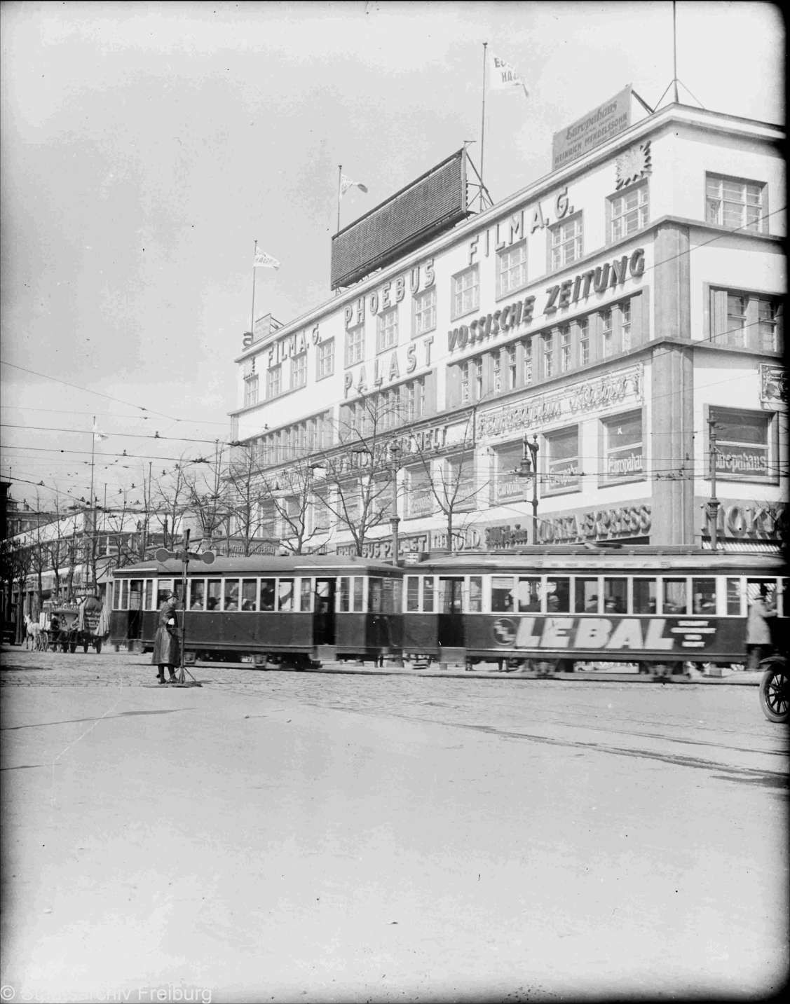 Das Deutschlandhaus in der Stresemannstraße in Berlin.